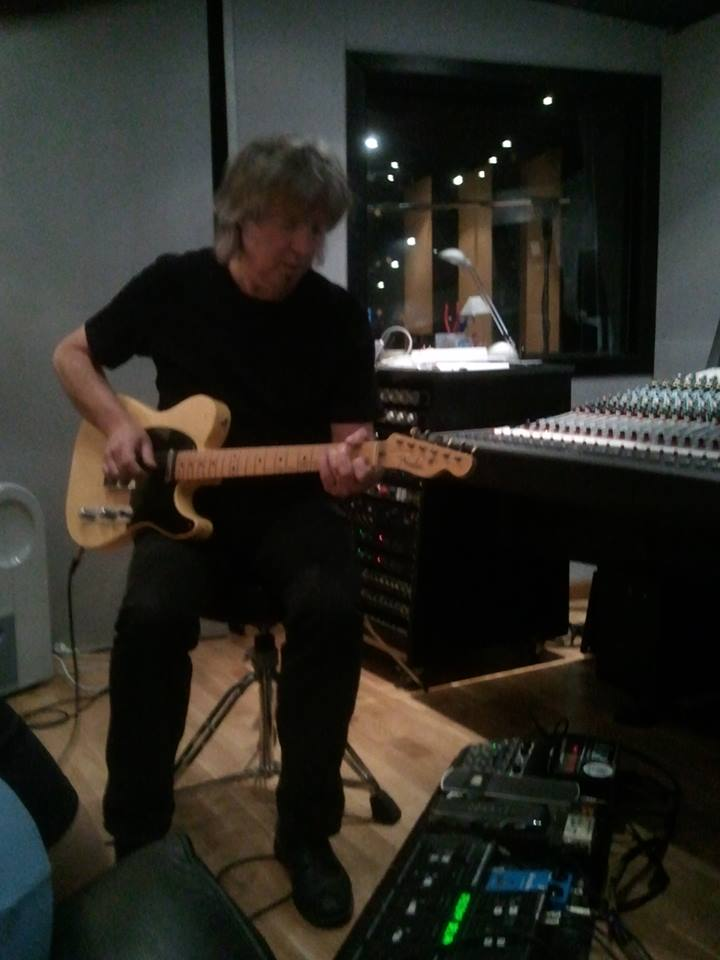 Yann Benoist au Studio de Bretagne d’Auray le 13 septembre 2011.